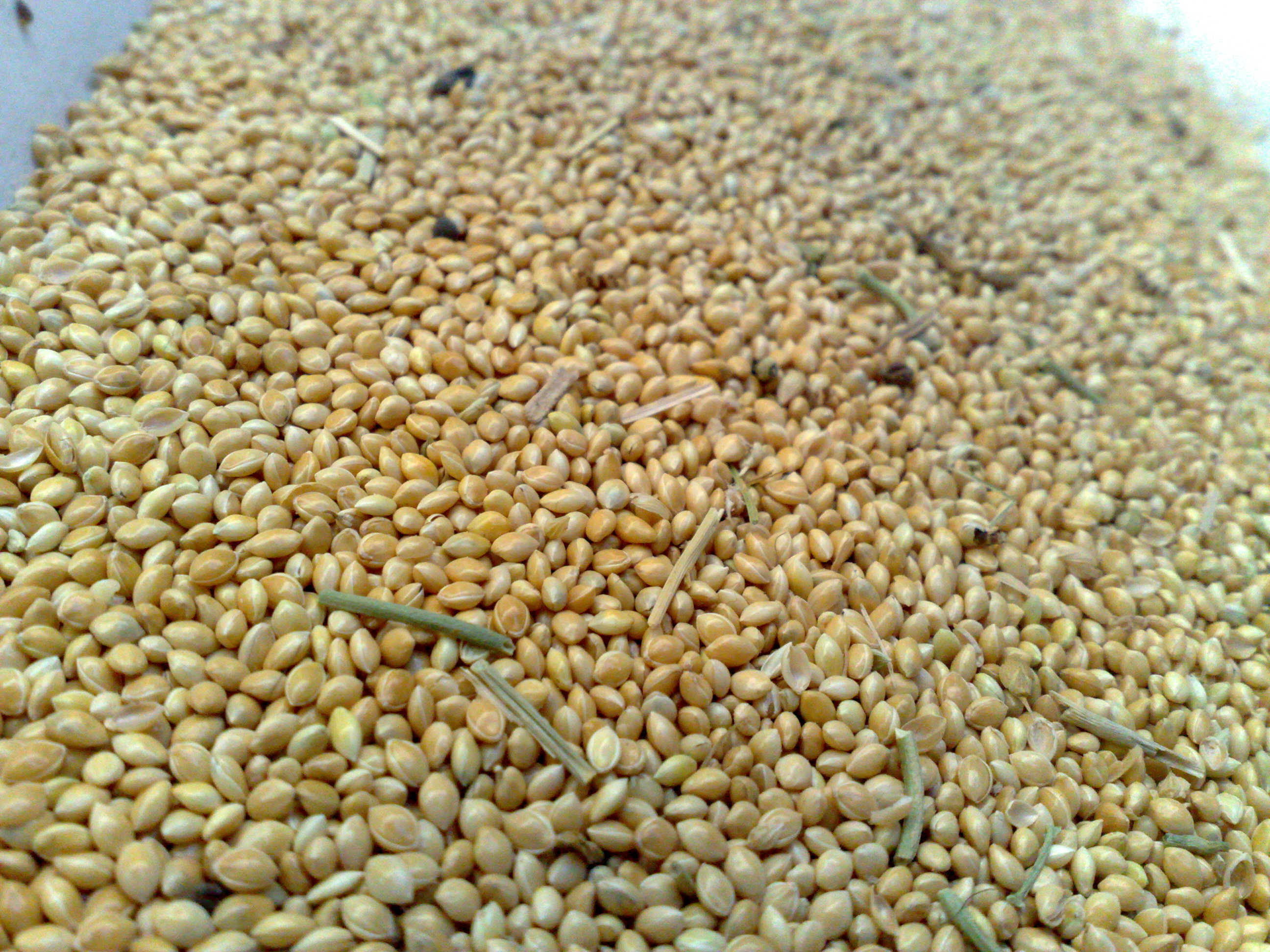 ارزن